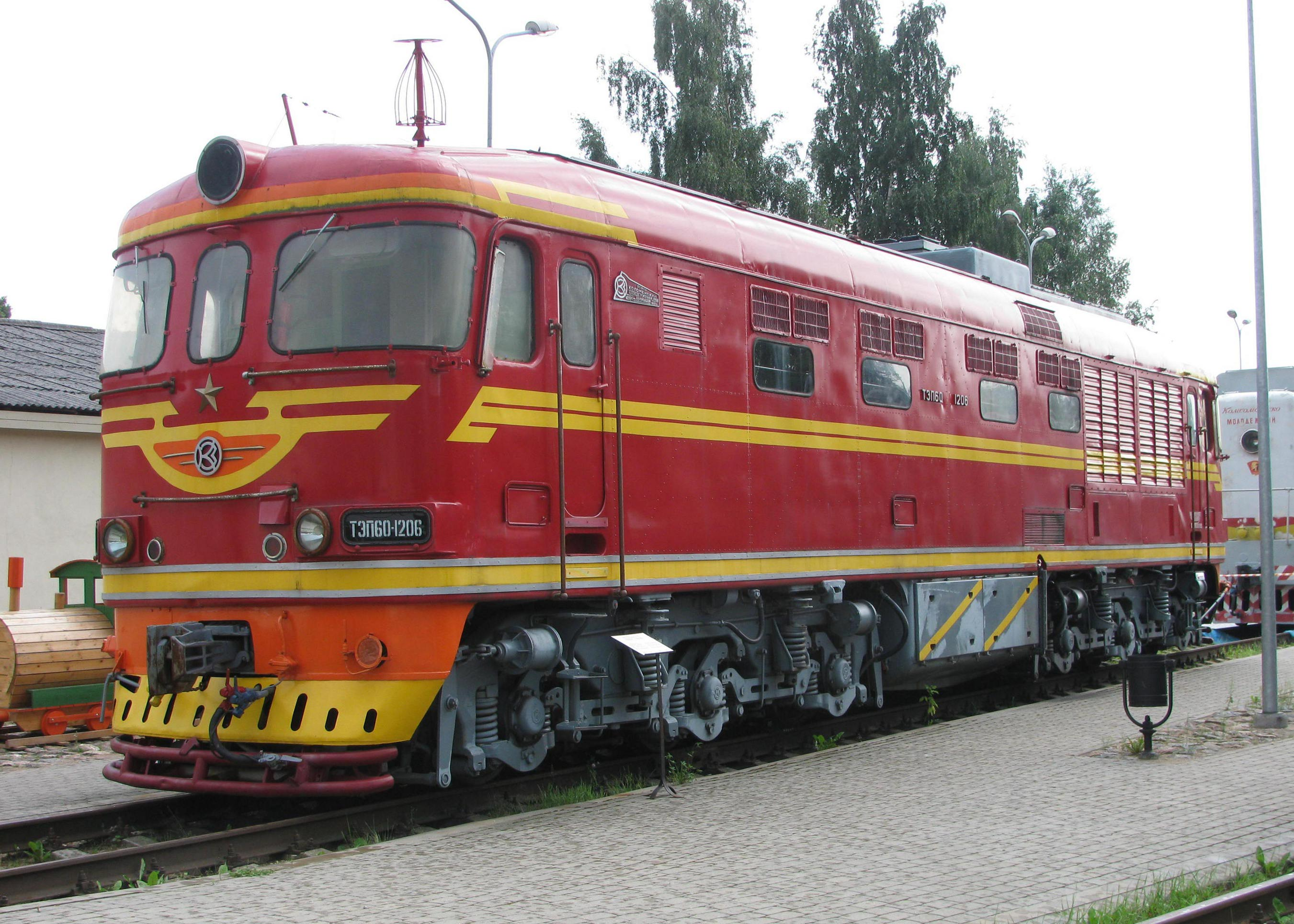 Lokomotiva TEP60-1206, výr. Kolomna 1984. V provozu v Lotyšsku od vyrobení do ukončení provozu celé řady v roce 1995. Latvijas dzelzceļa vēstures muzejs, Rīga.